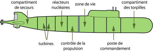 Description des compartiments du sous-marin Koursk Image réalisée par moi-même sous Adobe Illustrator Jean-Claude Duss 11 août 2005 à 16:09 (CEST)